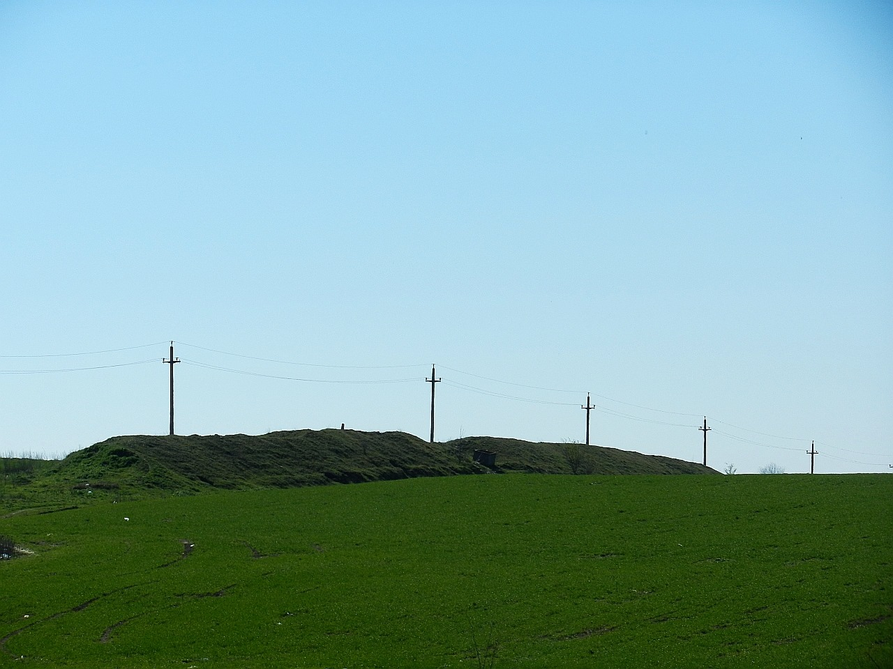 Parte din Valul lui Traian localizat la limita vestica a Medgidiei 02